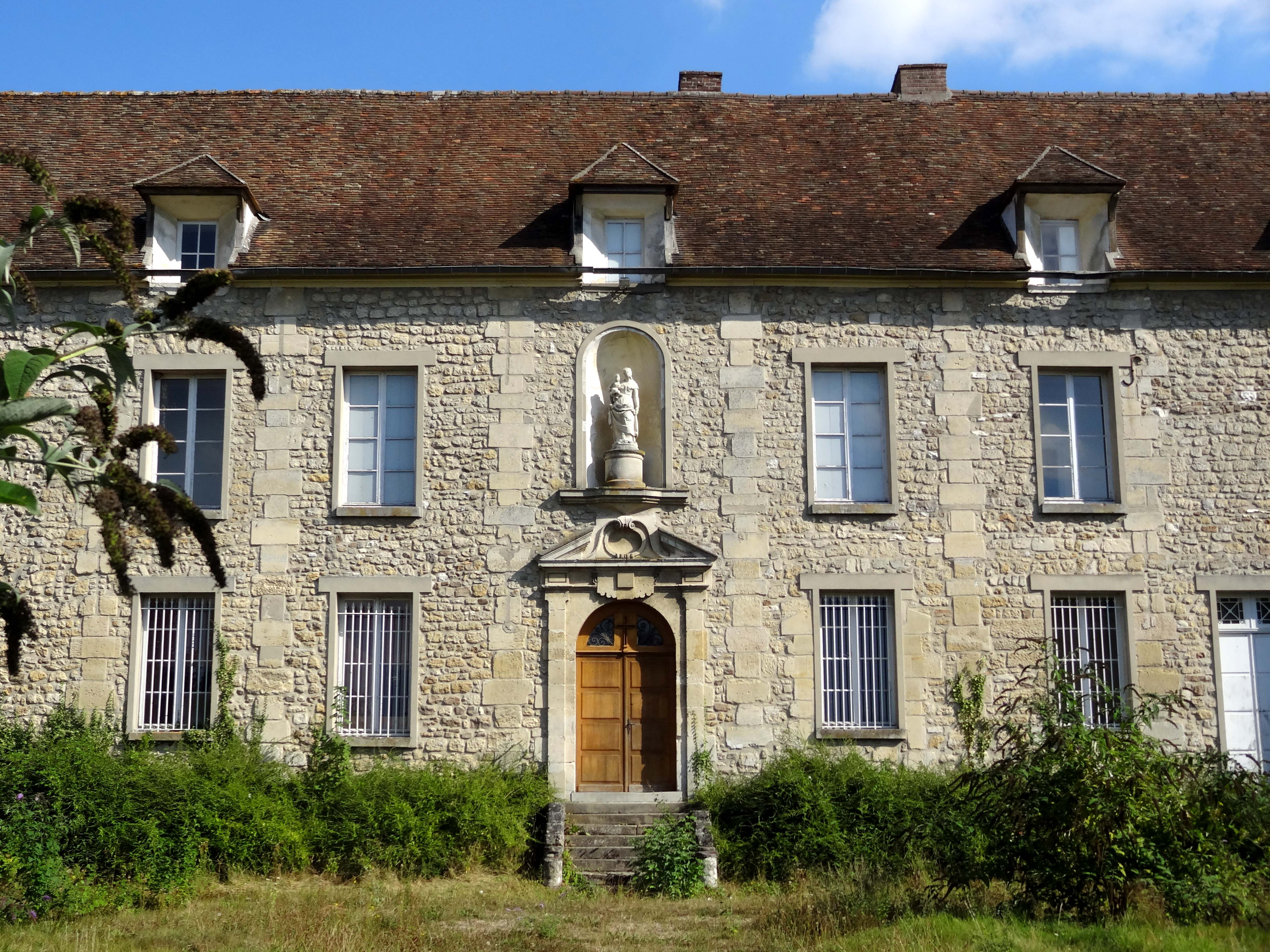 Marines - voir titre.